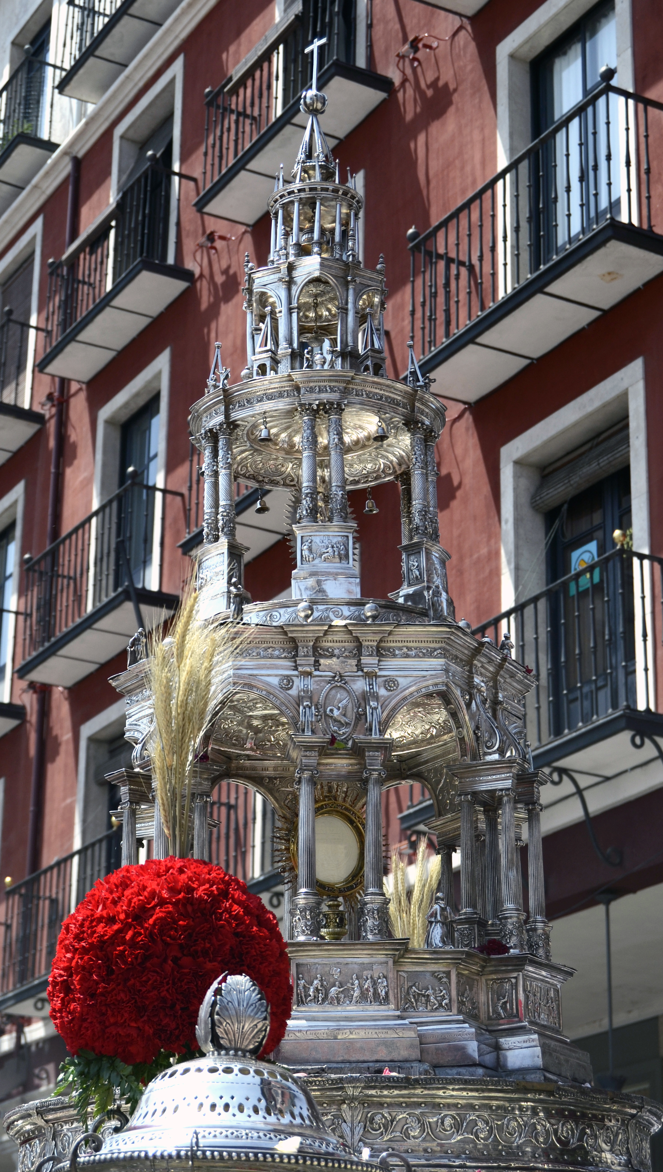 Custodia procesional de la catedral de Valladolid.